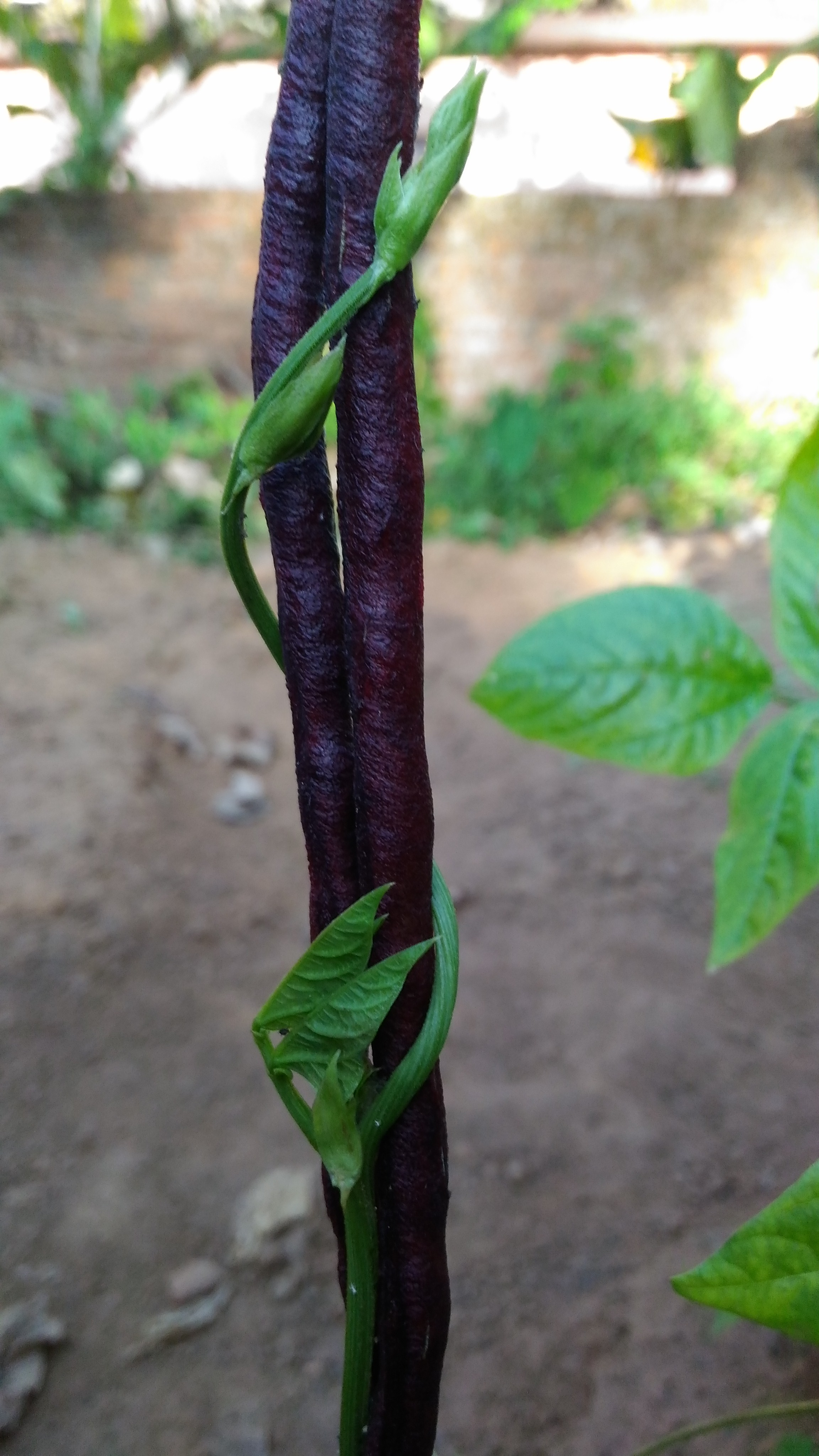 പയറുചെടി